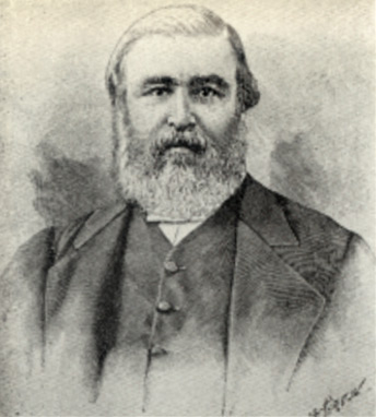 Cette photo a été tirée du Journal des Écoles du dimanche, 1893, p. 468. Jean-Paul Cook (1828-1886) a été pasteur méthodiste et un des fer de lance de la Société des Écoles du dimanche en France.